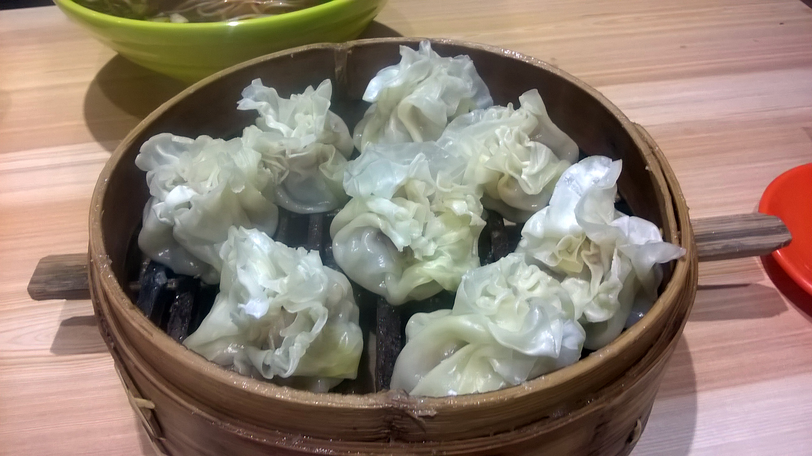 呼和浩特的稍麦。